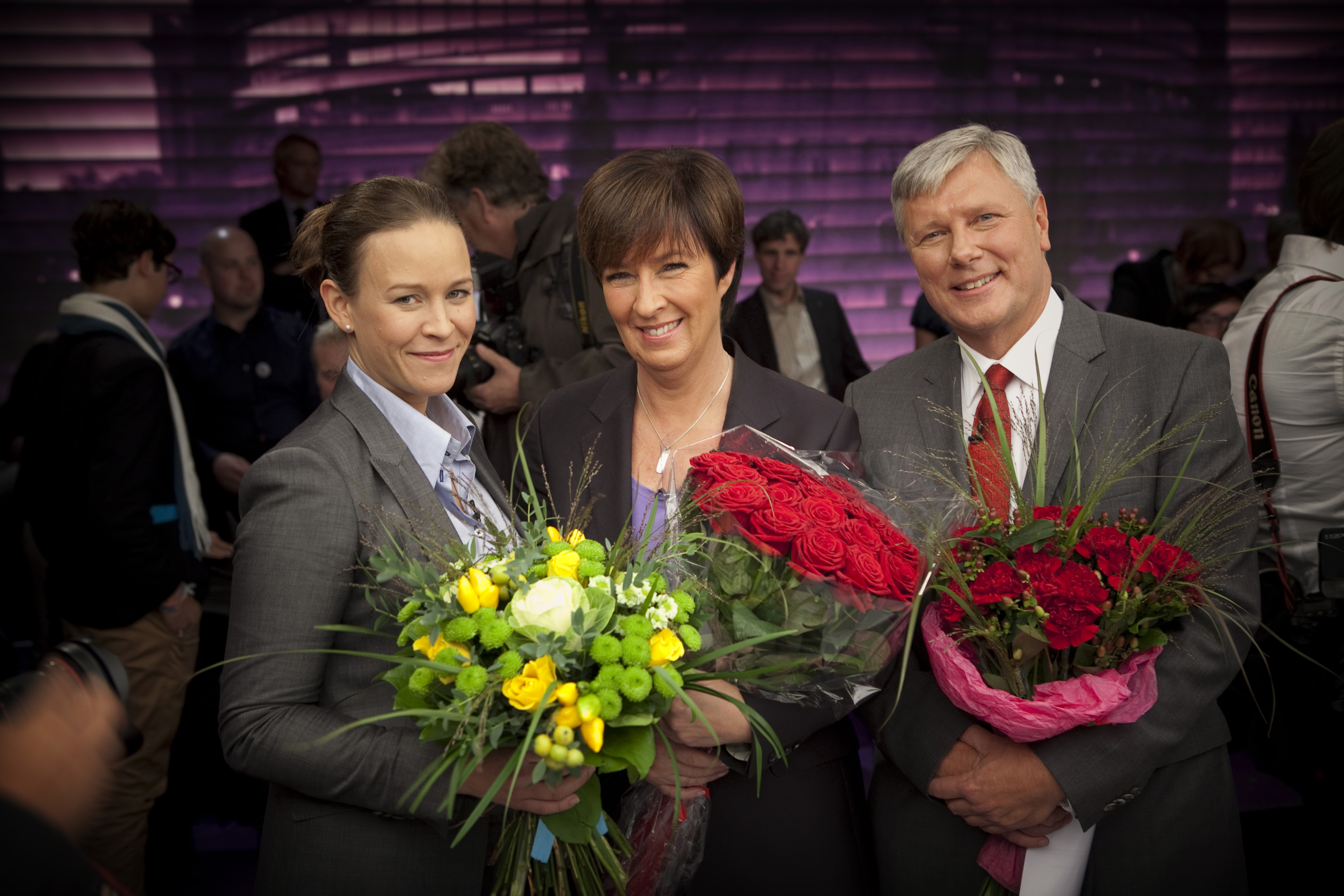 Slutdebatt i SVT. De rödgröna.